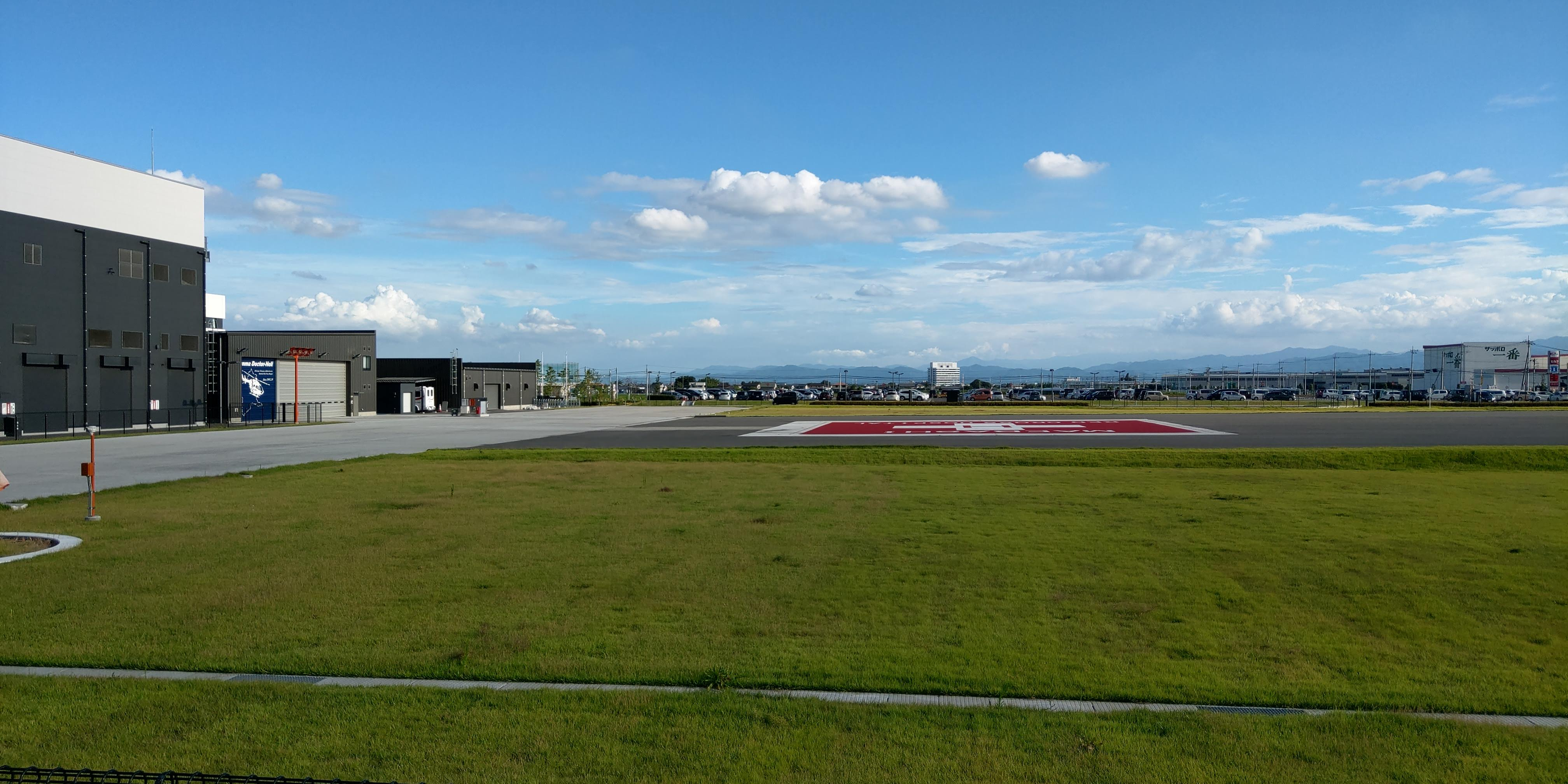 前橋赤十字病院 ドクターヘリ格納庫とヘリポート